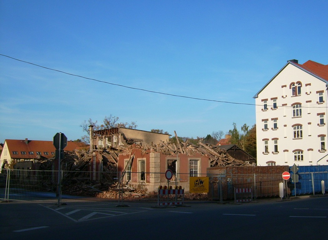 Gotha Ruine Zum Mohren